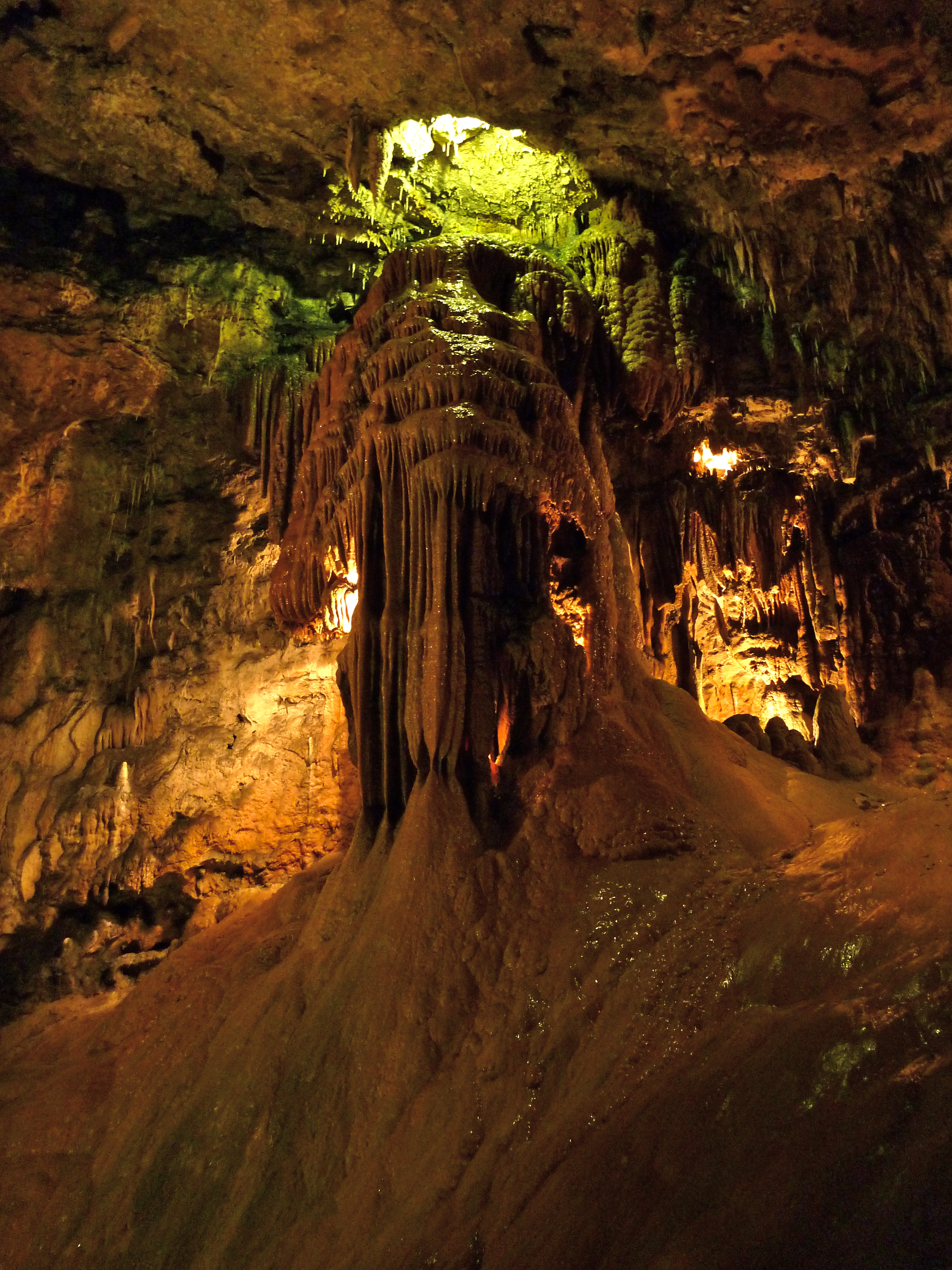 Cueva de Valporquero